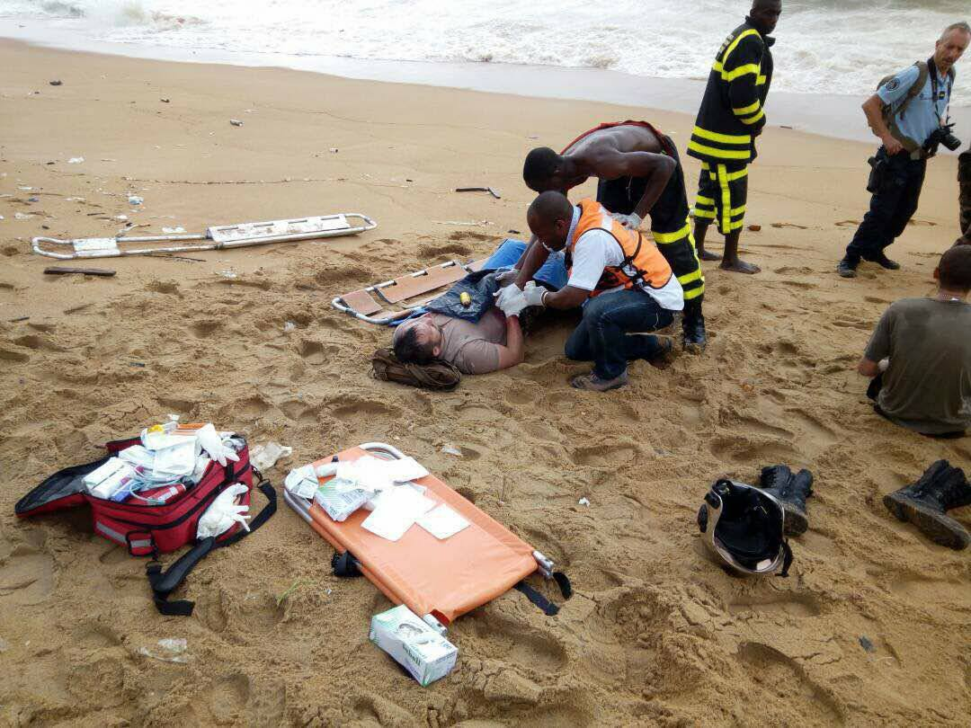 Un survivant secouru au lieu du crash d’avion abîmé au bord de la mer au Port Bouet, au large d’Abidjan, Côte d’ivoire, 14 octobre 2017. (VOA/Narita Namasté)